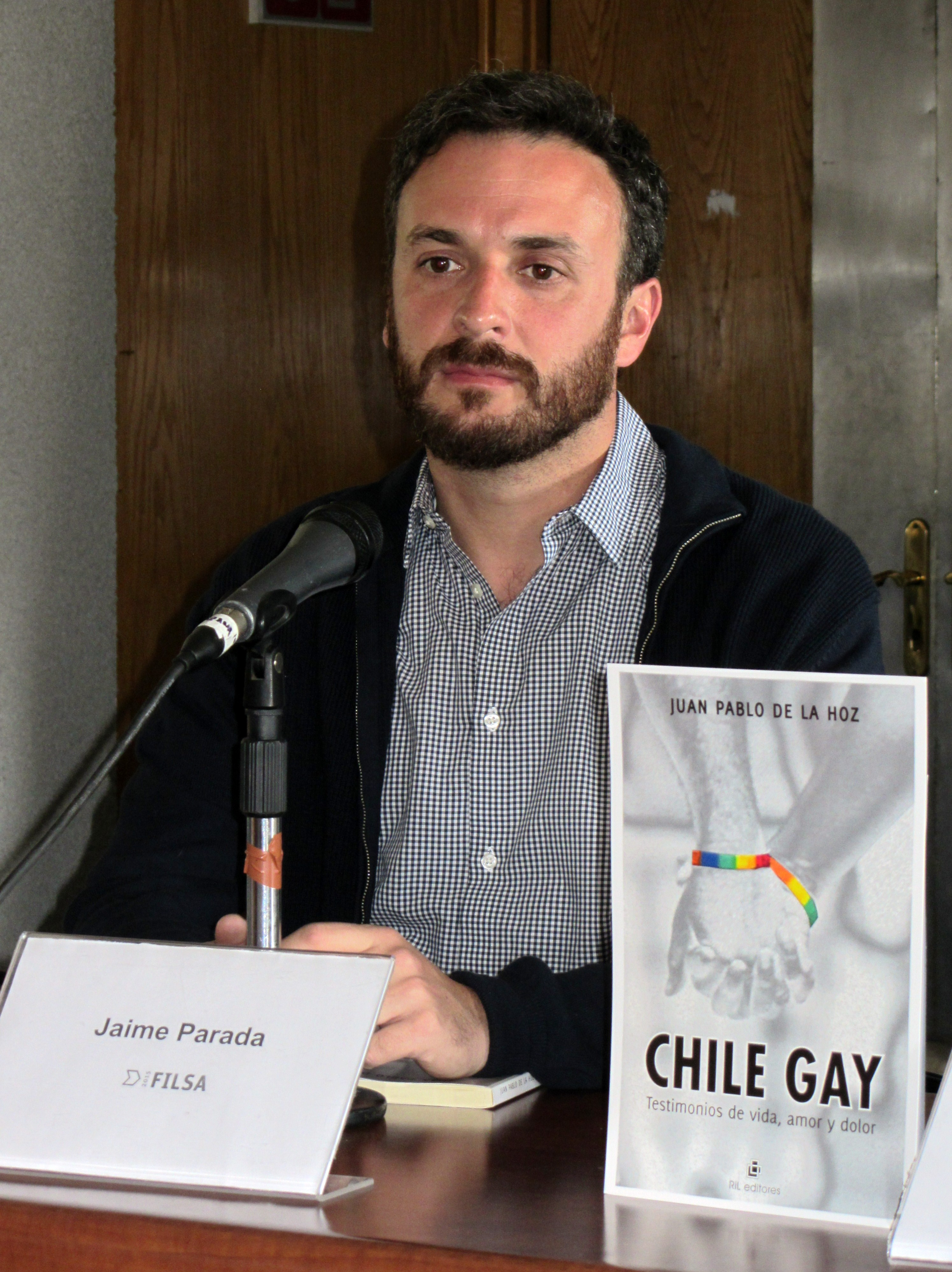 El politico y activista chileno de derechos LGBT Jaime Parada en la Feria Internacional del Libro de Santiago 2015